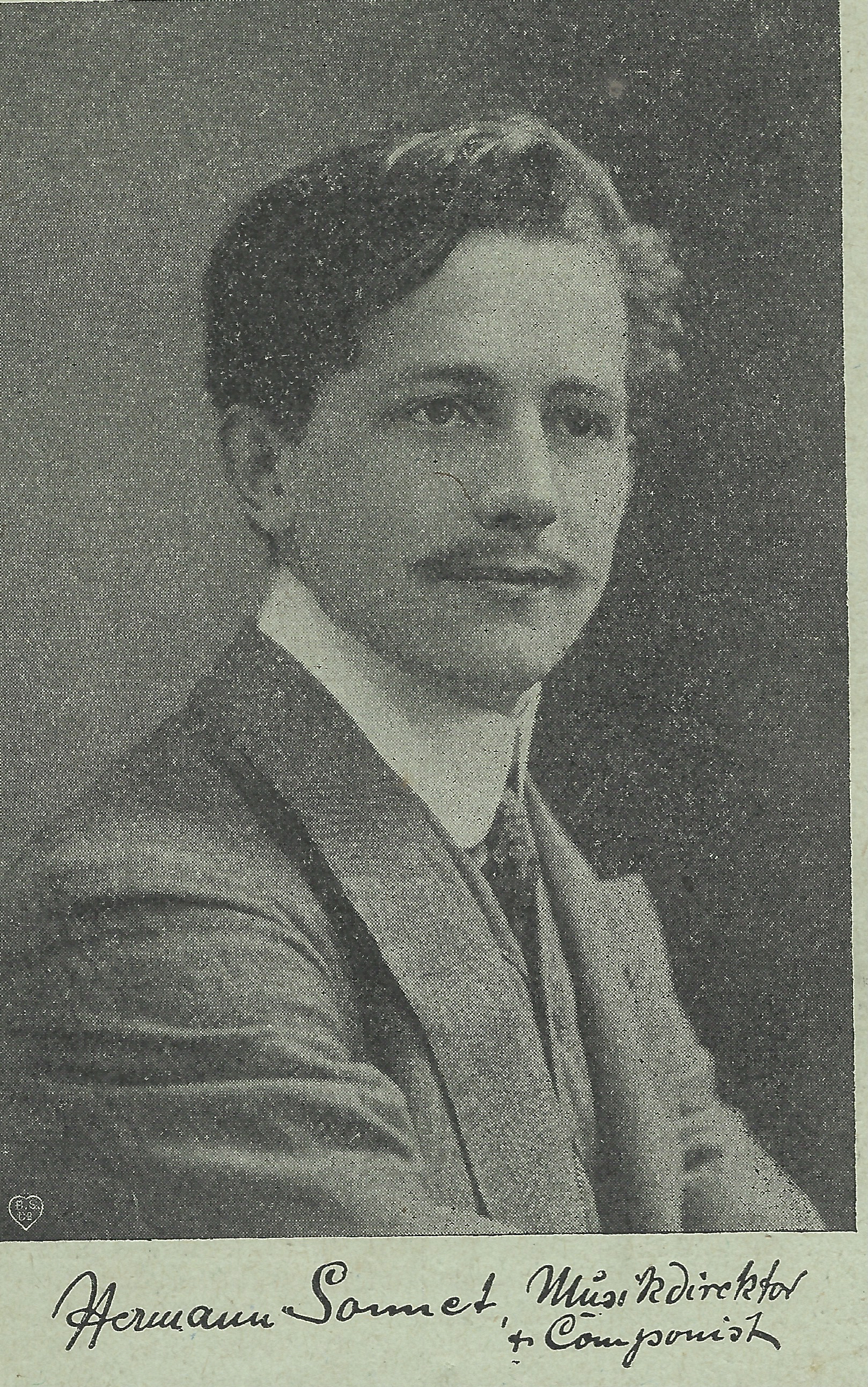 Composer Hermann Sonnet (1881-1936)